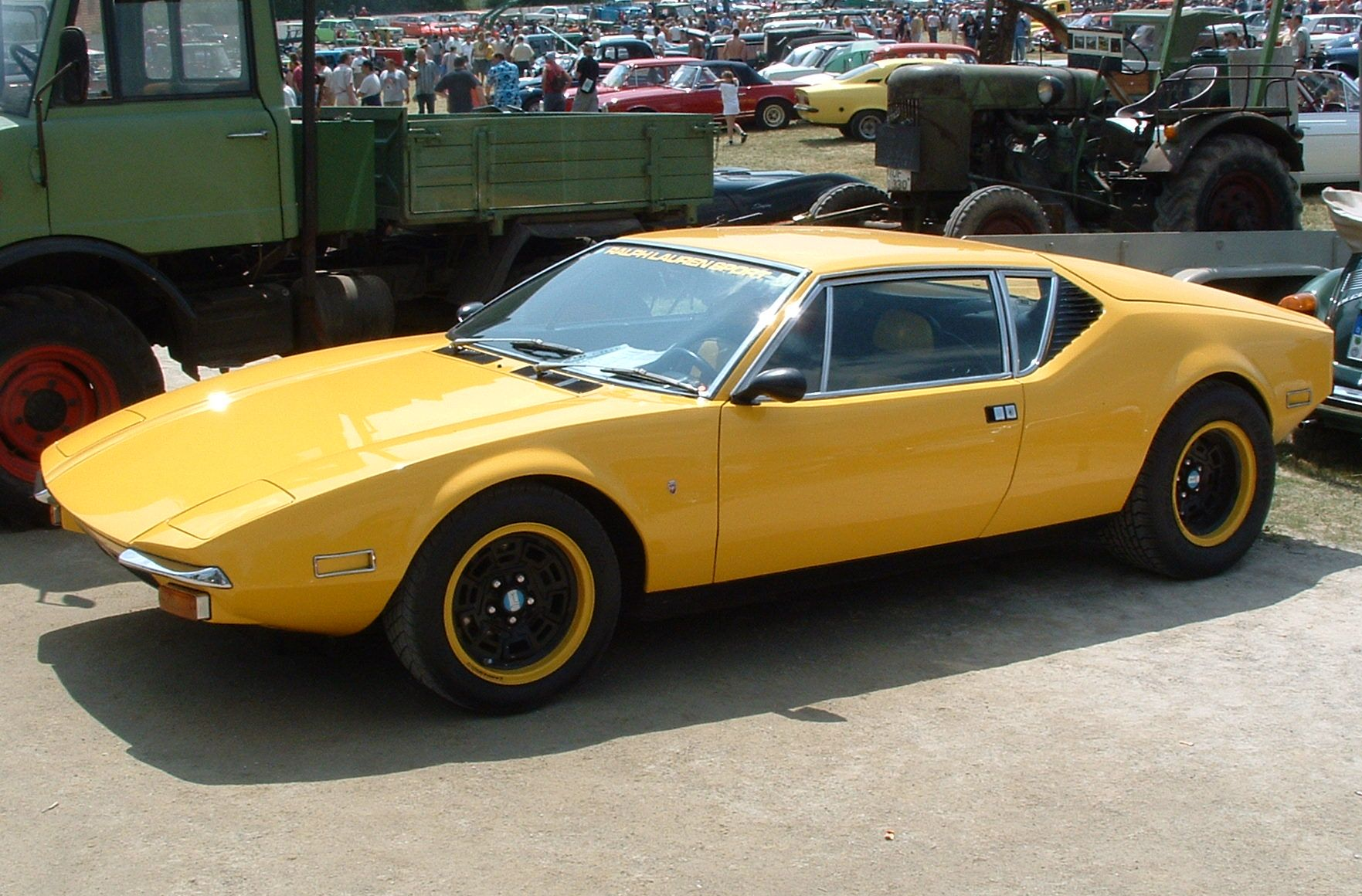 De Tomaso Pantera Seitenansicht